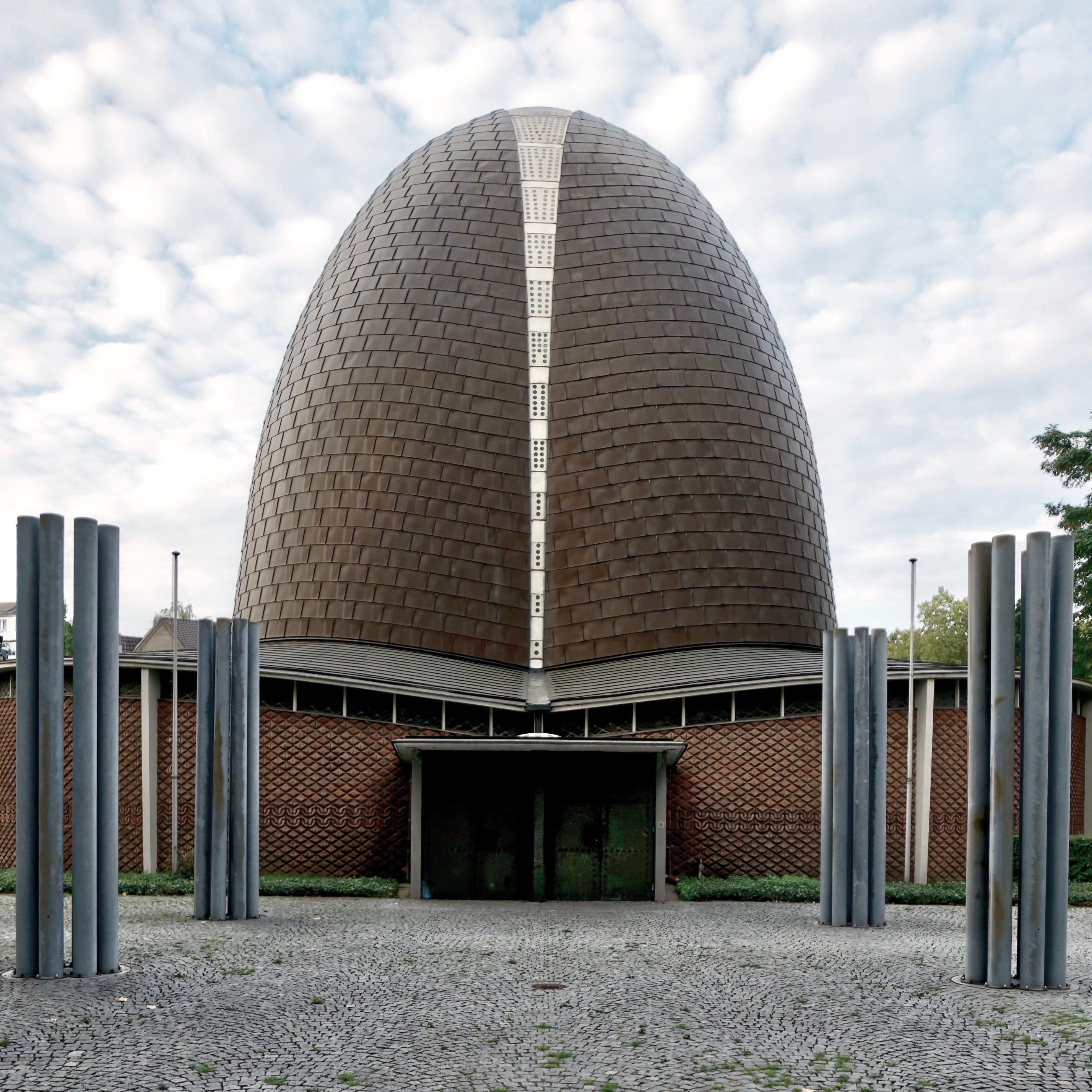 Eingangsportal des Kirchenraums der Rochuskirche in Düsseldorf, Baujahr 1954This is a photograph of an architectural monument., no. 1120